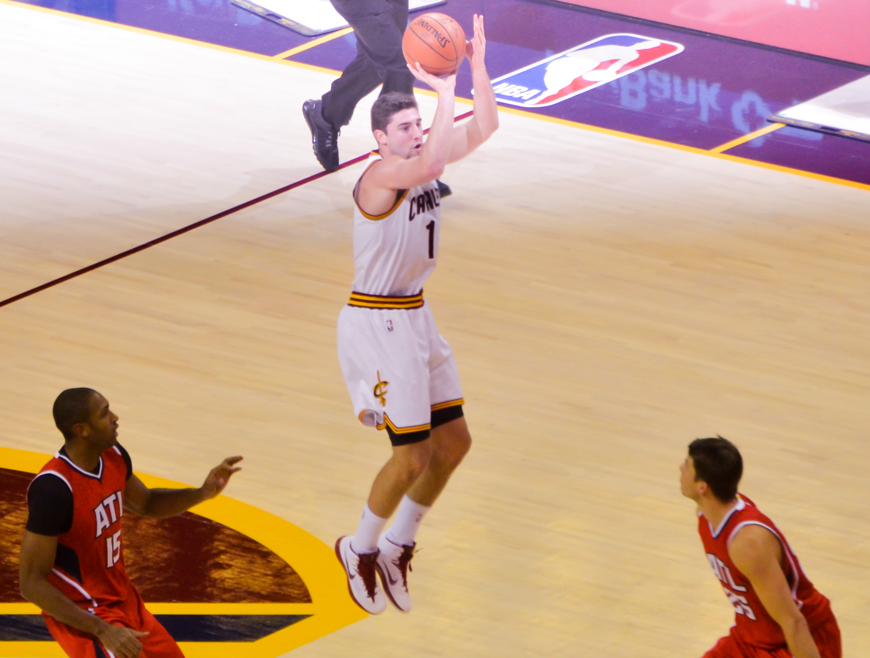 Joe Harris